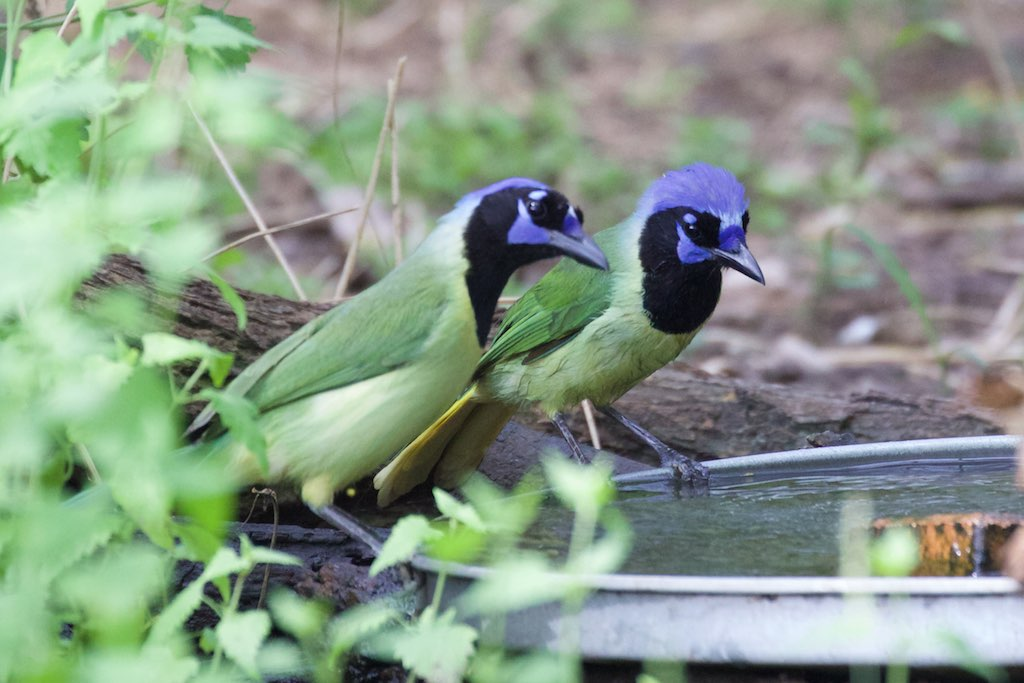 Green Jay|Bentsen-Rio Grande SP|TX | 2015-05-14at16-10-4012